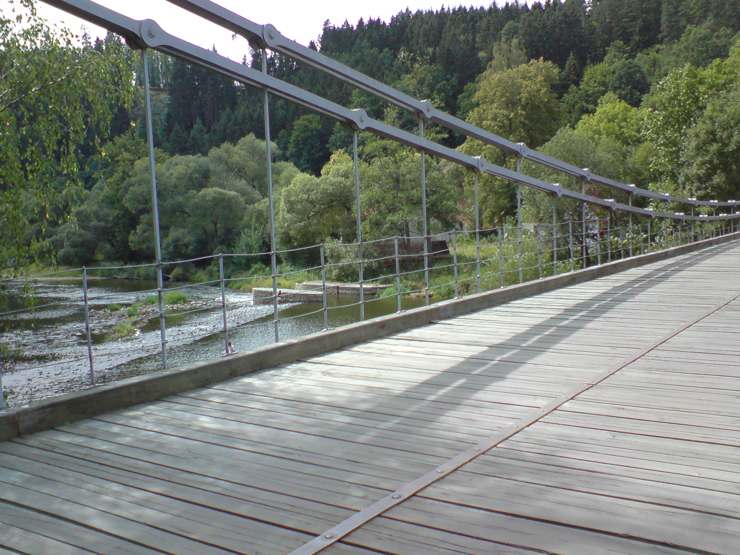 Stádlecký most